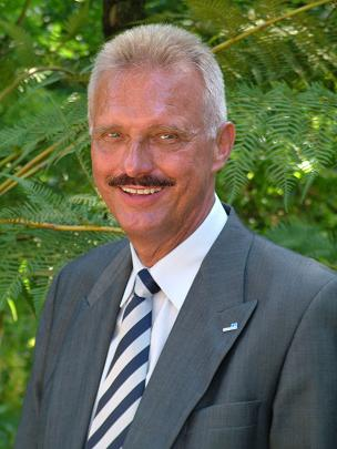 Wilhelm Barthlott